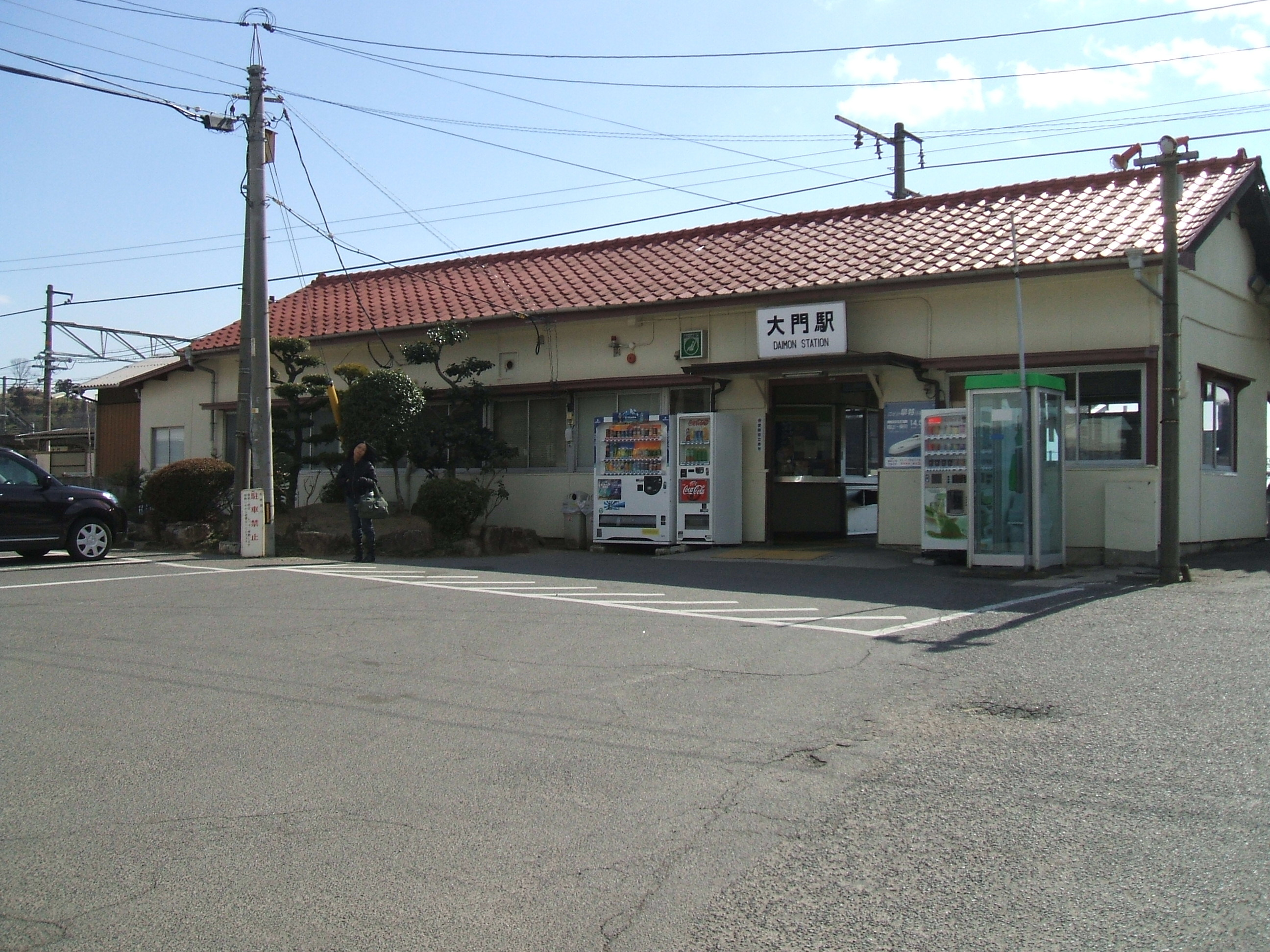 広島県福山市にあるJR大門駅